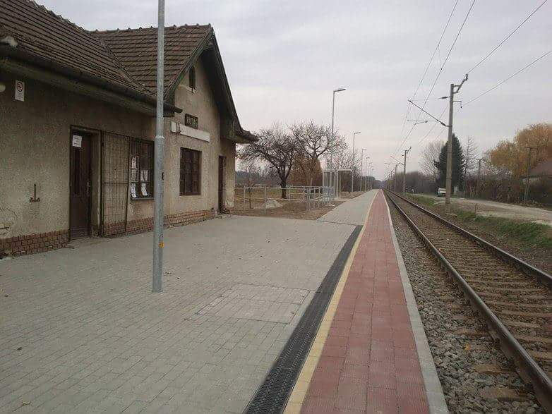 A peron az állomás épület mellet nézve